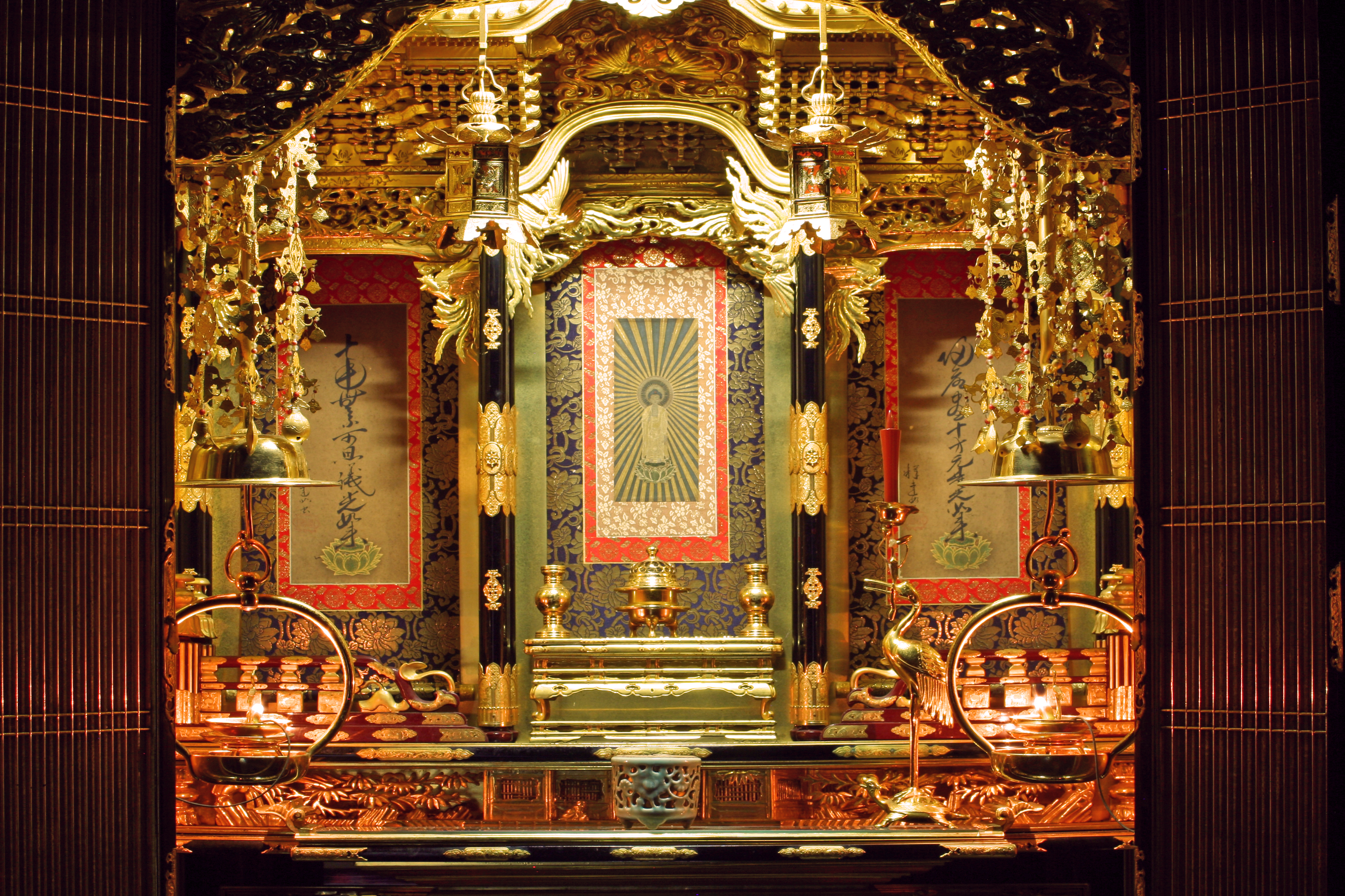 明かりが灯された仏壇の中心部。